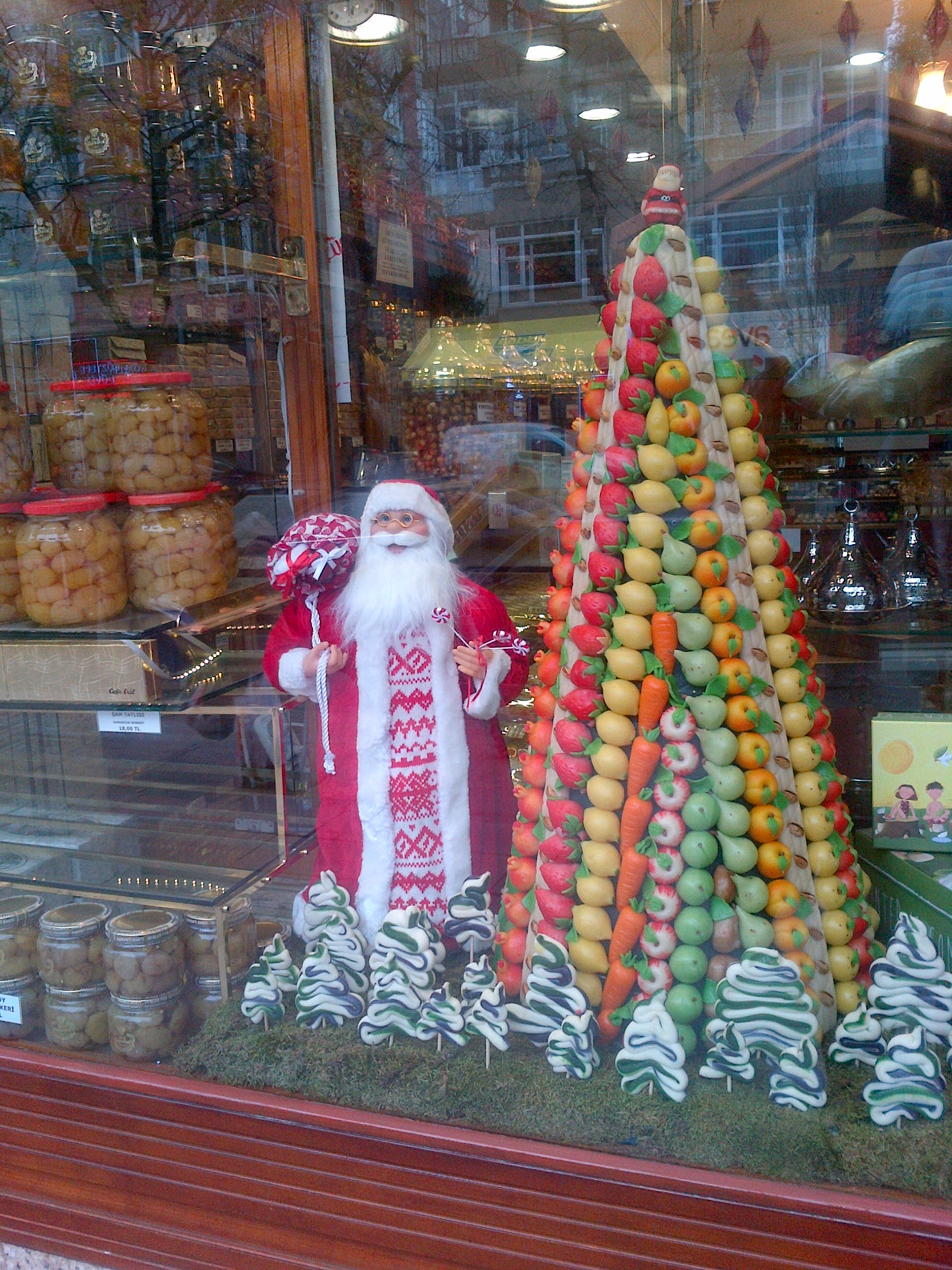 Arbol de Navidad hecho de mazapan en Göztepe, Kadıköy, Istanbul. A la izquierda jarros con dulces de castana.